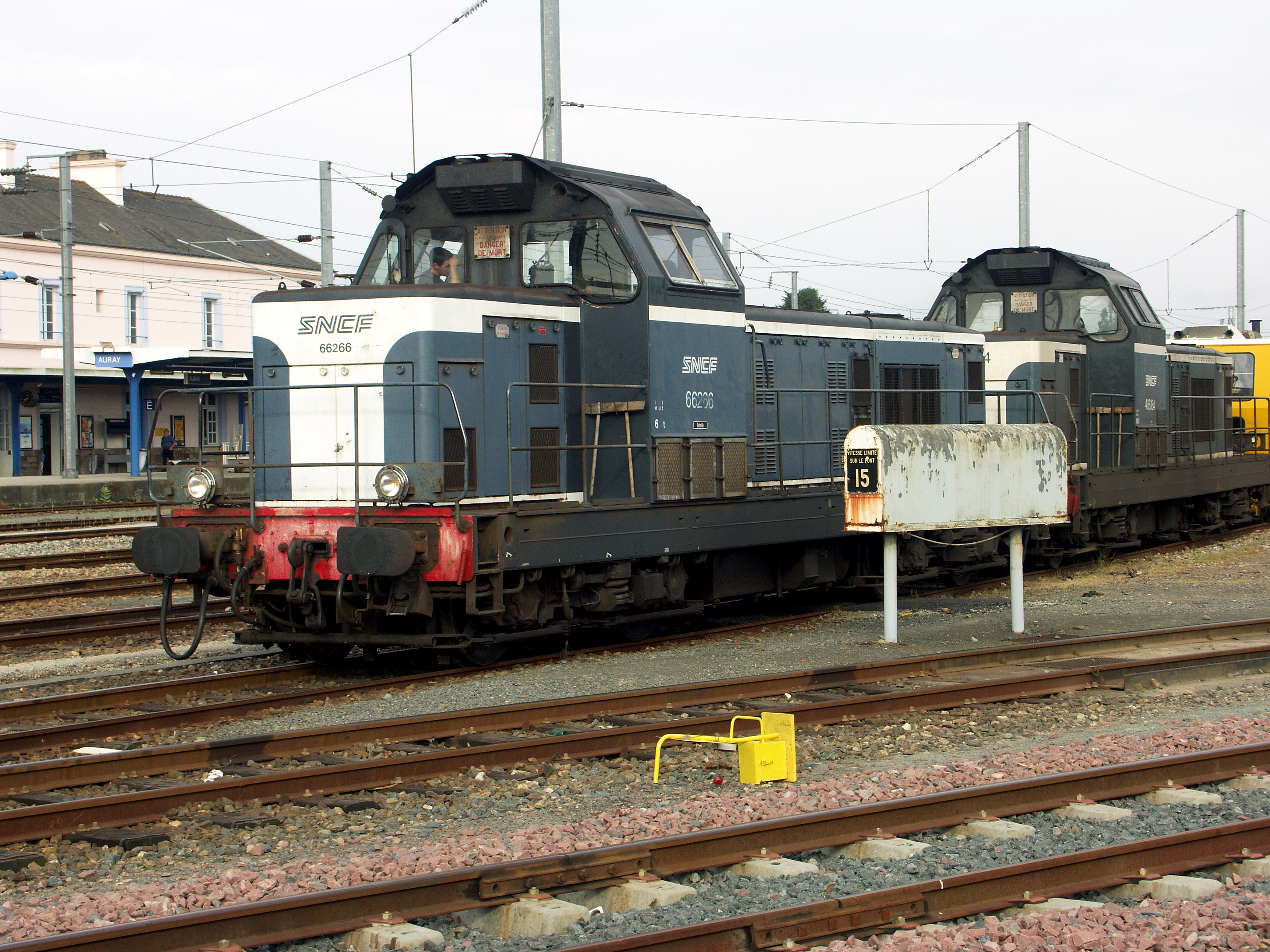 The original description was: Locomotive diesel type BB 66000, n°66266, en gare d'Auray. Photographie prise le 10 juin 2006 par Utilisateur:Crouchineki.